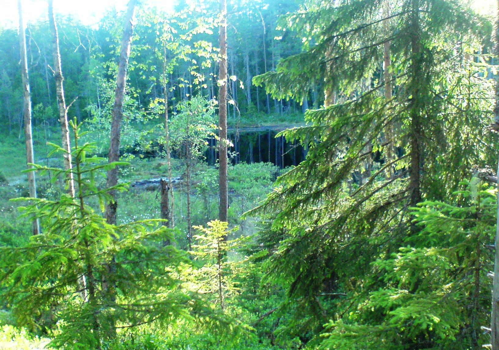 Myrerudtjern på Lierfoss i Aurskog-Høland kommune.